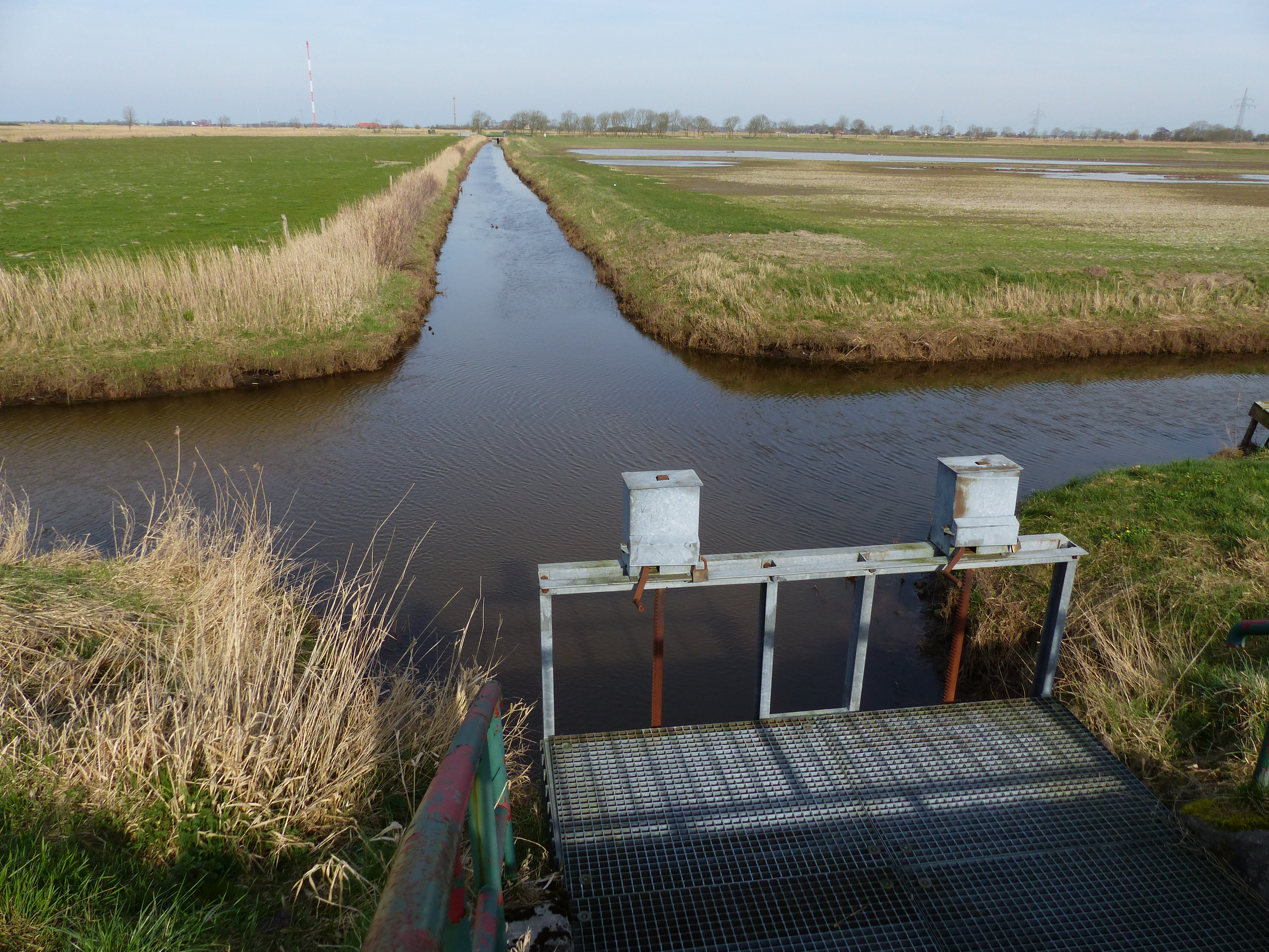 Blick vom Deich am Benser Tief: Siel mit Bettenwarfer Leide